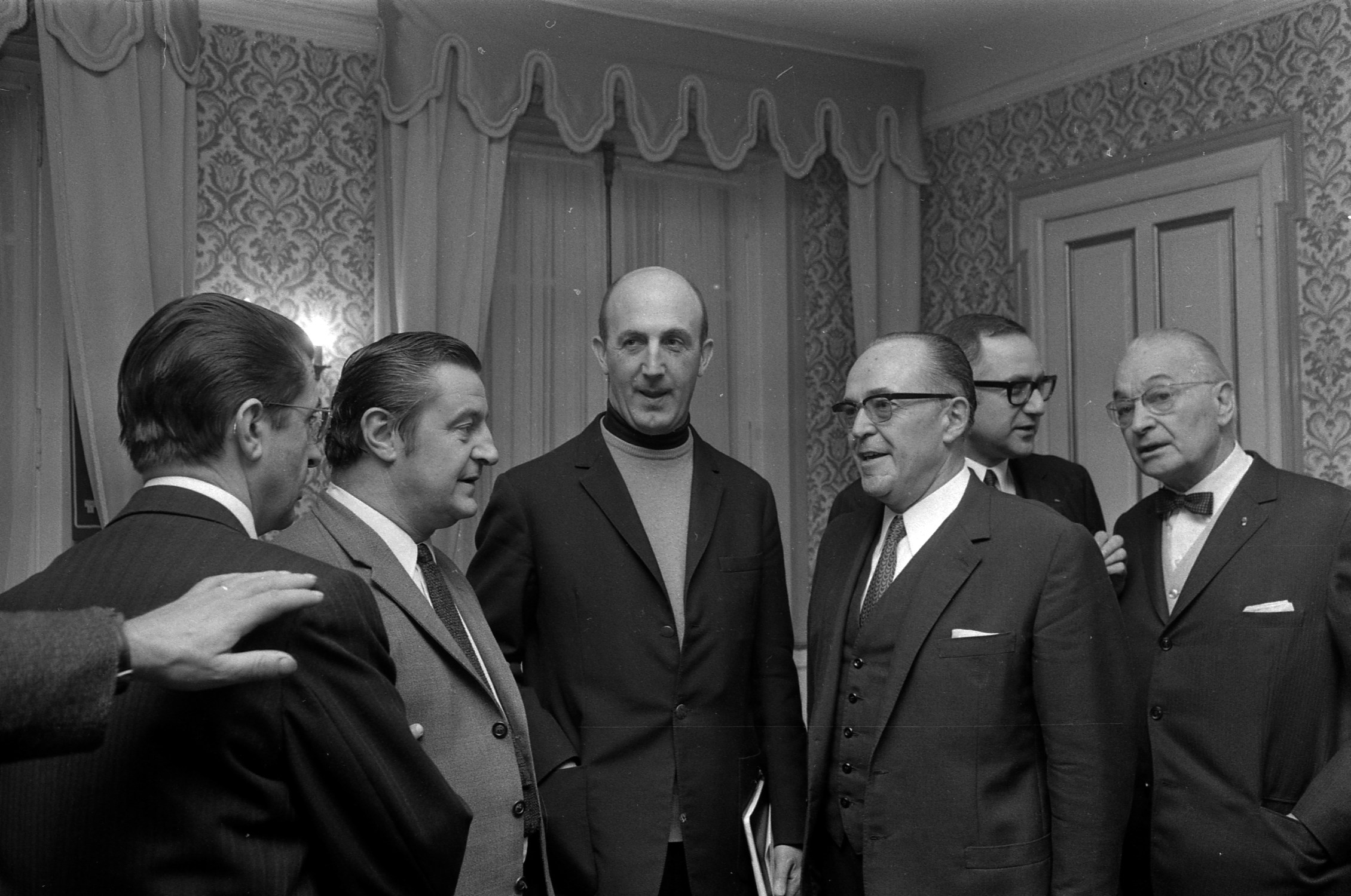 Grand-Hôtel, 31 rue de Metz. 17 février 1971. Vue de Pierre Baudis, premier adjoint au maire de la ville de Toulouse, lors d'une conférence de presse dans un salon de l'hôtel, présentant les candidats (dont André Brouat et André Turcat) de sa liste d'opposition au maire Louis Bazerque pour les élections municipales les 14 et 21 mars 1971.